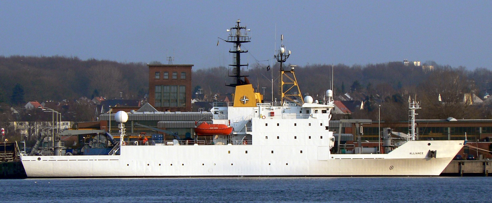 Forschungsschiff Alliance im Kieler Hafen. IMO Number: 8833752 MMSI Number: 211212500 Callsign: DRMX Length: 92 m Beam: 14 m